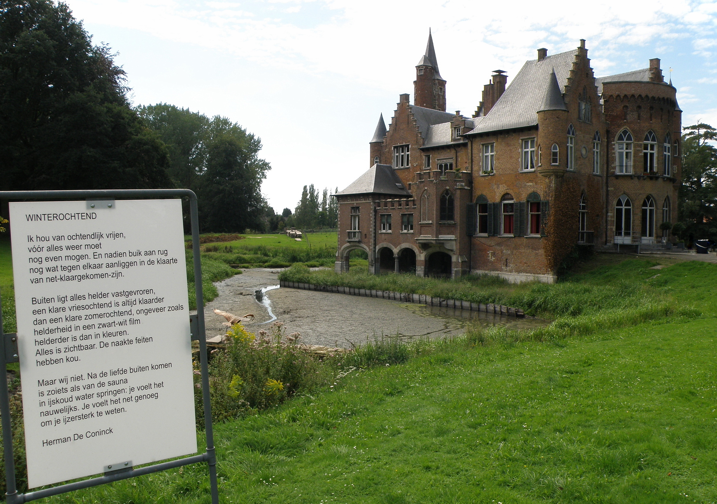 Bazel, deelgemeente van gemeente Kruibeke (prov. Oost-Vlaanderen, België). Kasteel van Wissekerke, oostgevel. Links: bord met gedicht van Herman De Coninck.